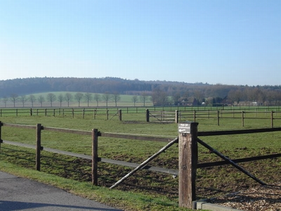 Nedersaksies: Anzicht op et Montferland